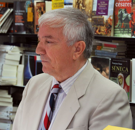 El escritor murciano Pancracio Celdrán Gomáriz firmando libros en la Feria del Libro de Madrid.